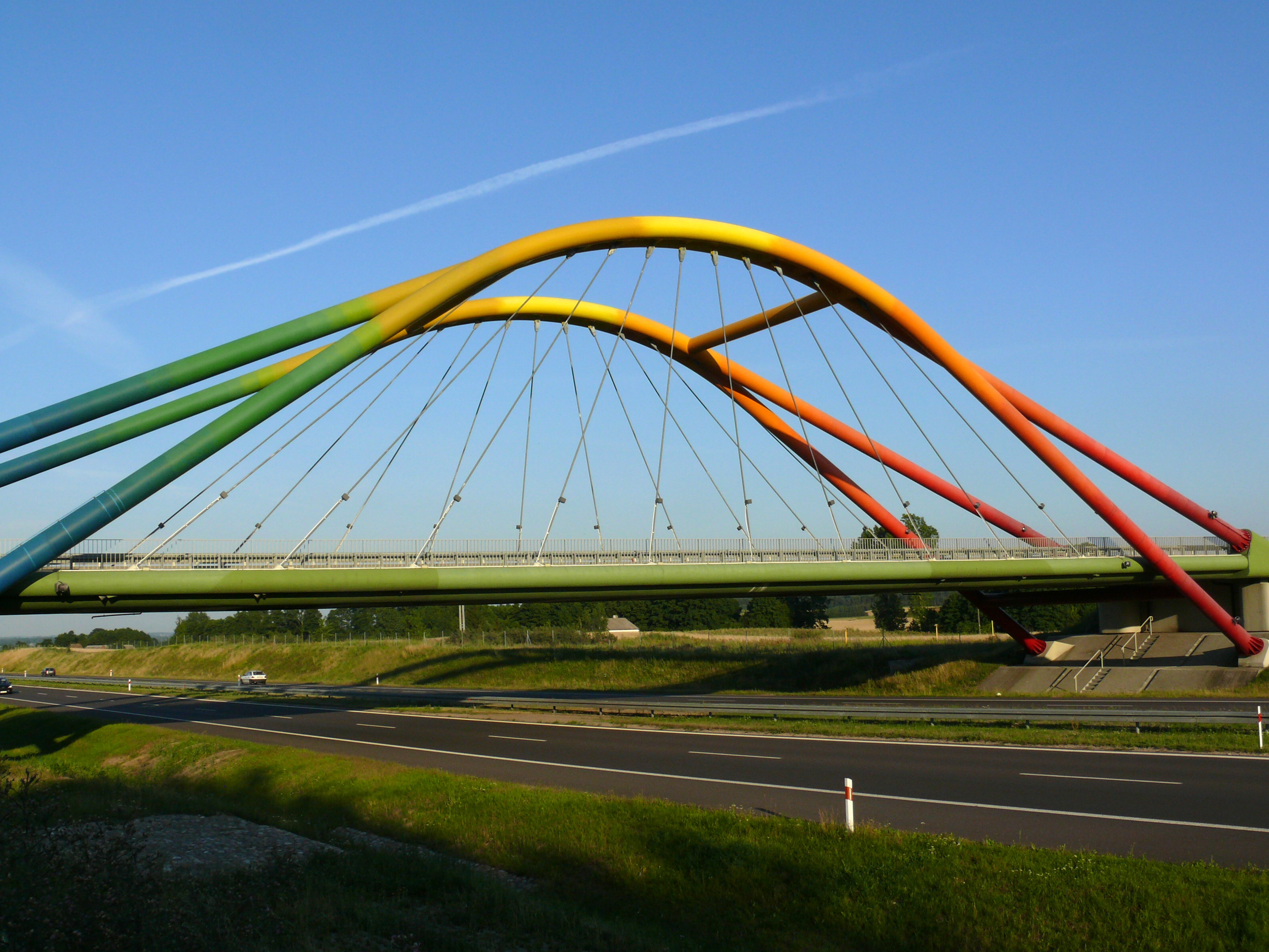 Wiadukt nad A2 w gminie Kościelec